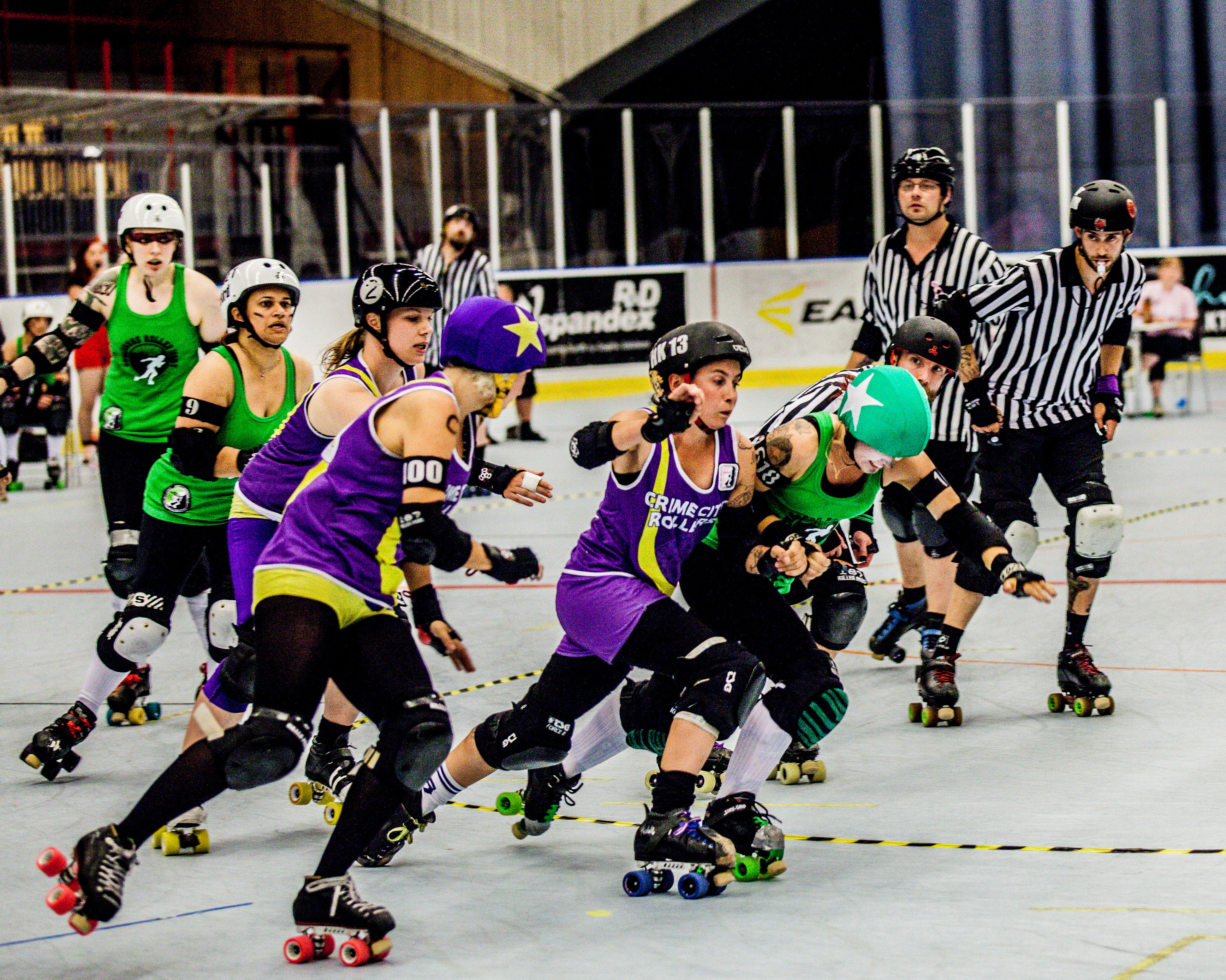 Crime City Rollers mot Gothenburg Roller Derby. Semifinal SM i Roller Derby 2013 i Halmstad Arena